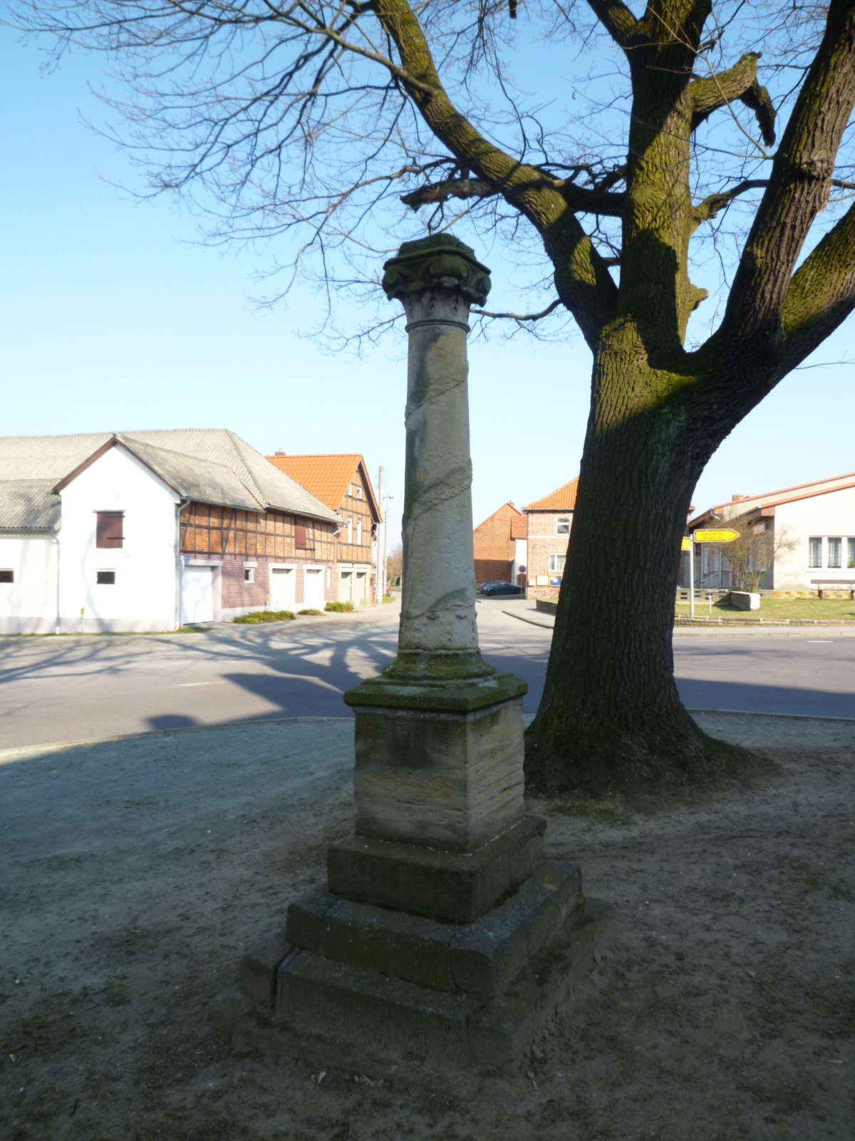 Calvörde, Kriegerdenkmal in Mannhausen 1871 (Siegessäule)